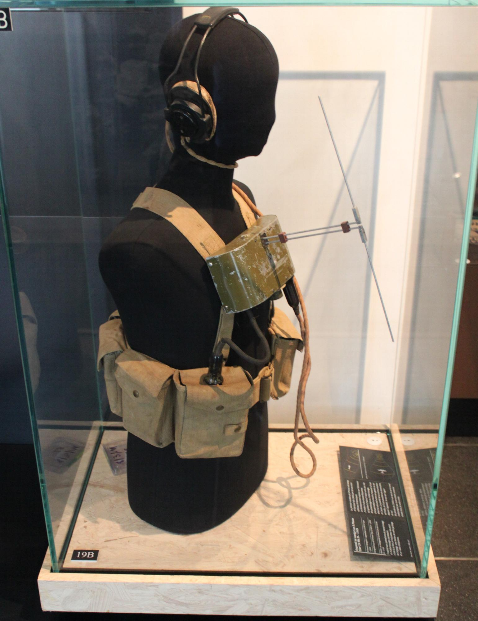 Aufgenommen im Musée de l'Armée, Paris